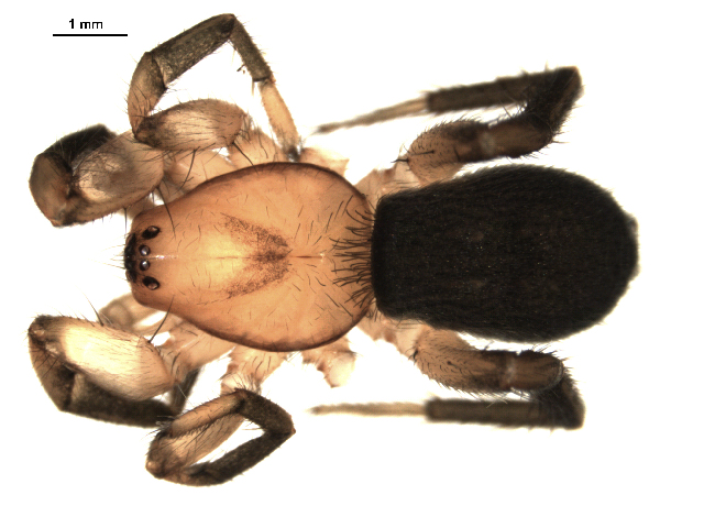 Gnaphosa sericata